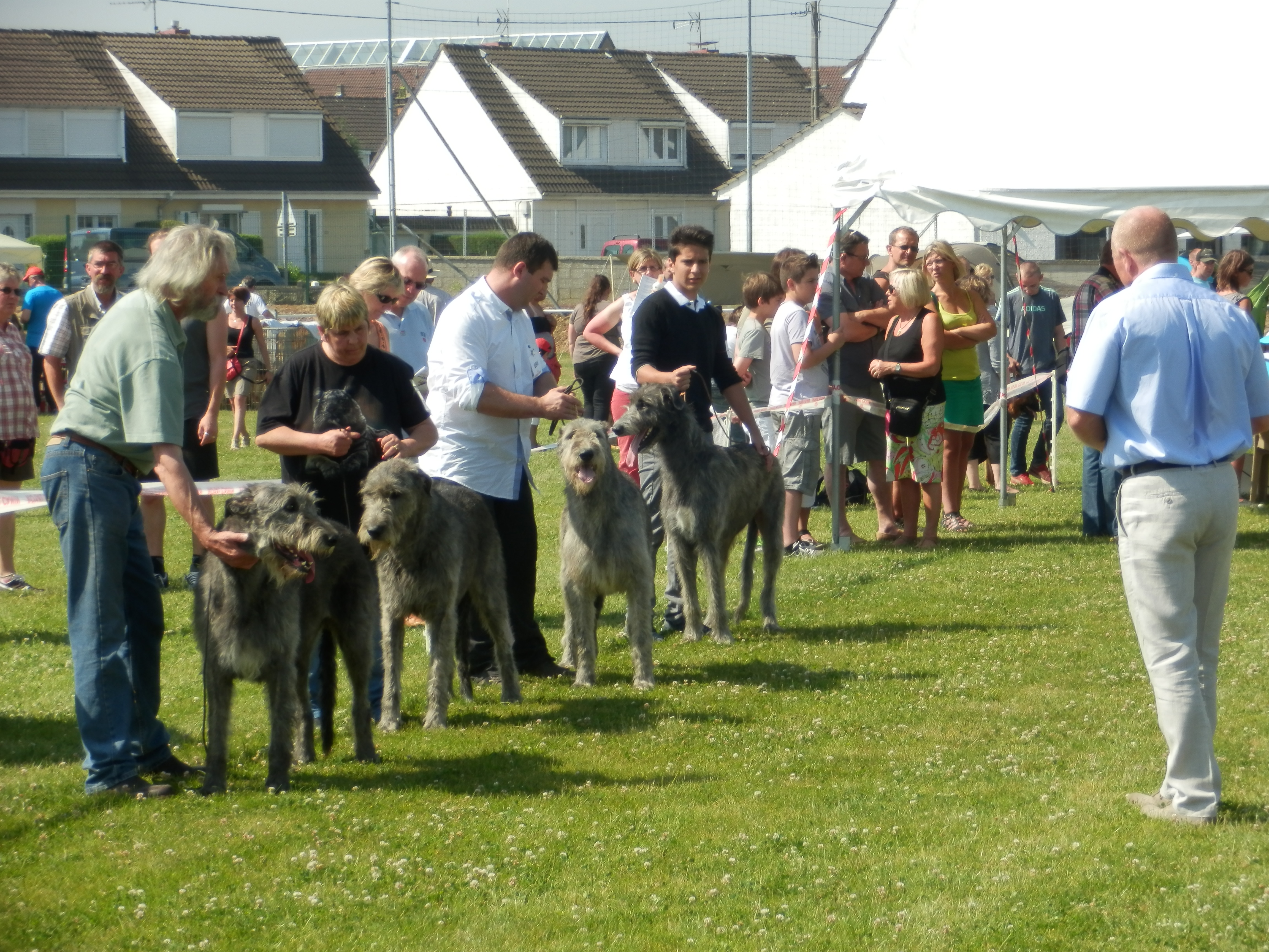 Irish wolfhound lors d'un concours canin